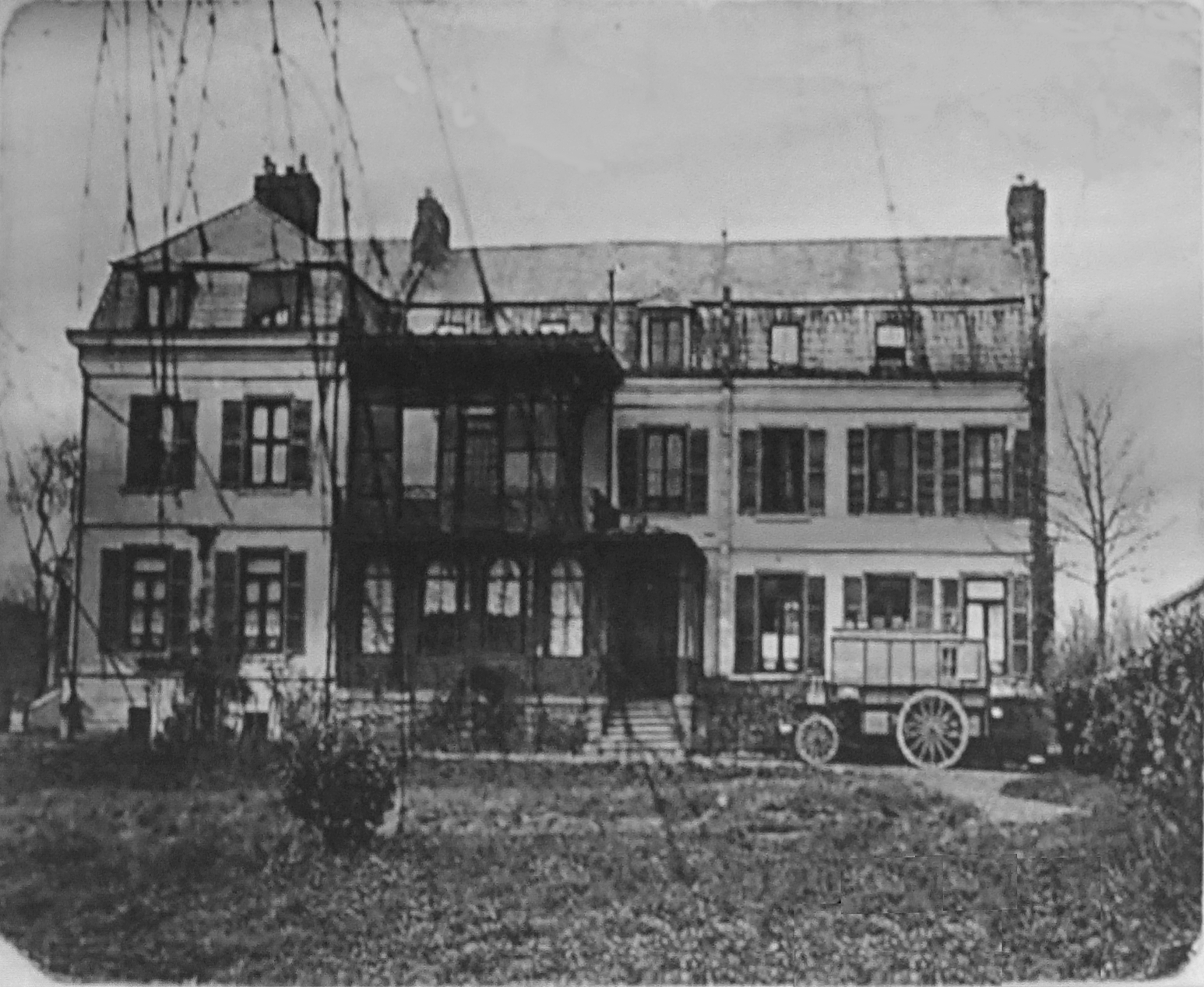 carte postale de Cagny chateau.